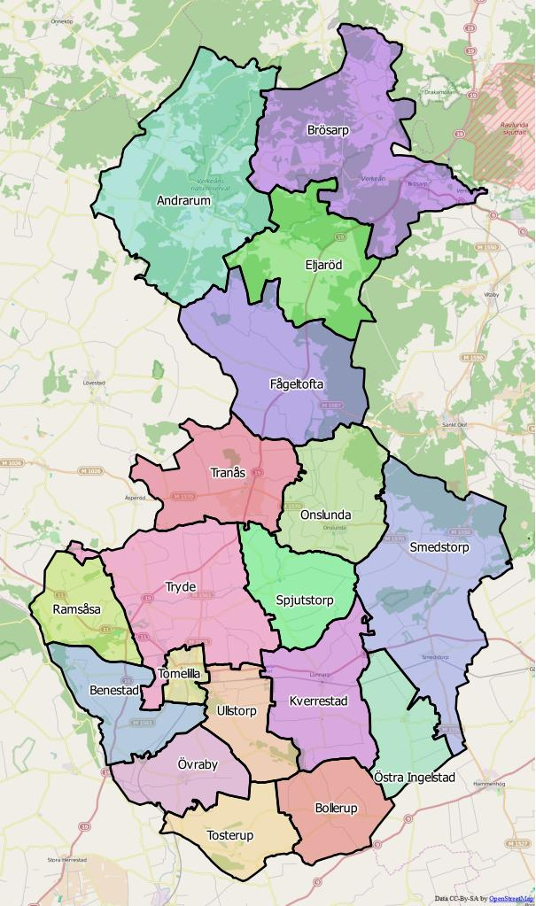 Distriktsindelningen i Tibro kommun World file: 64.8469917405549694 0 0 -64.8469917405549694 1539588.94344802456907928 7517490.40297040157020092